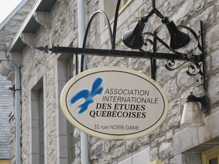 Association internationale des études québécoises. Enseigne du siège social, place Royale à Québec, Canada